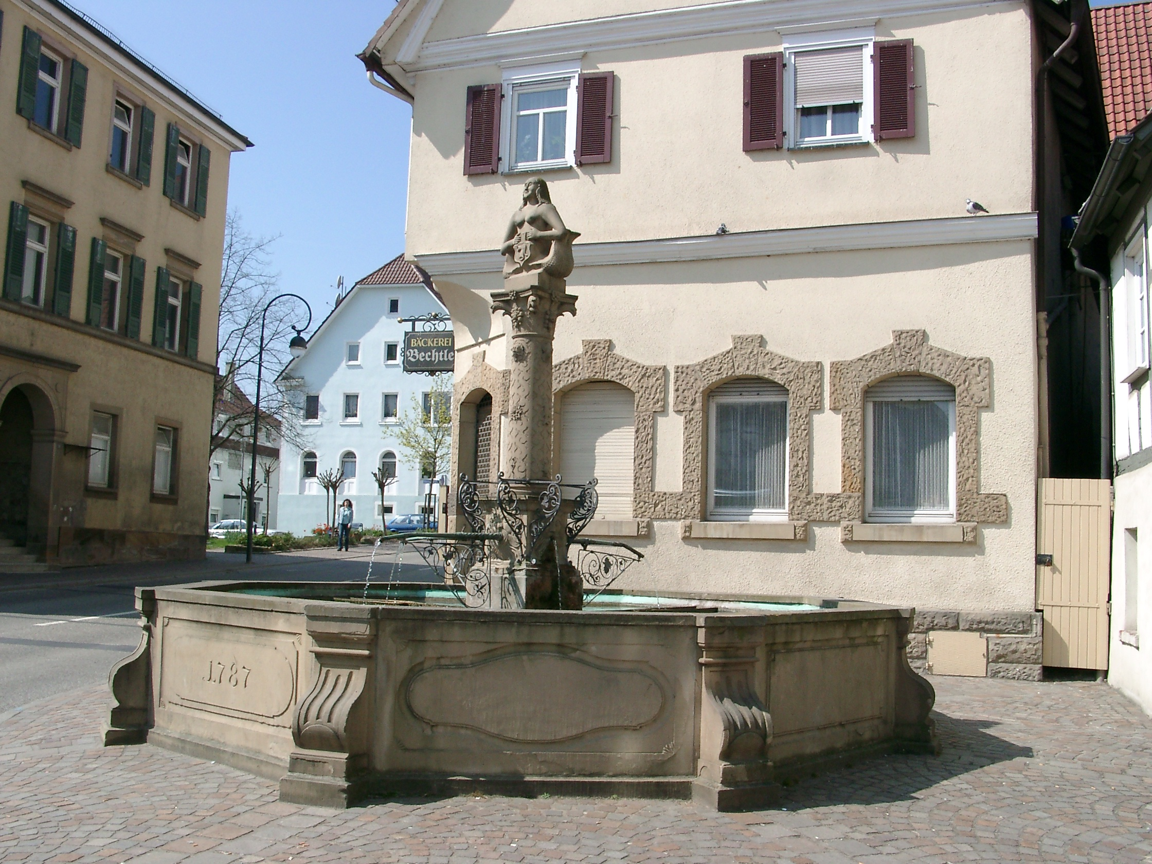 Güglingen, Brunnen am Marktplatz